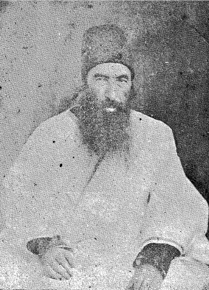 میرزا موسی وزیرلشکر آشتیانی